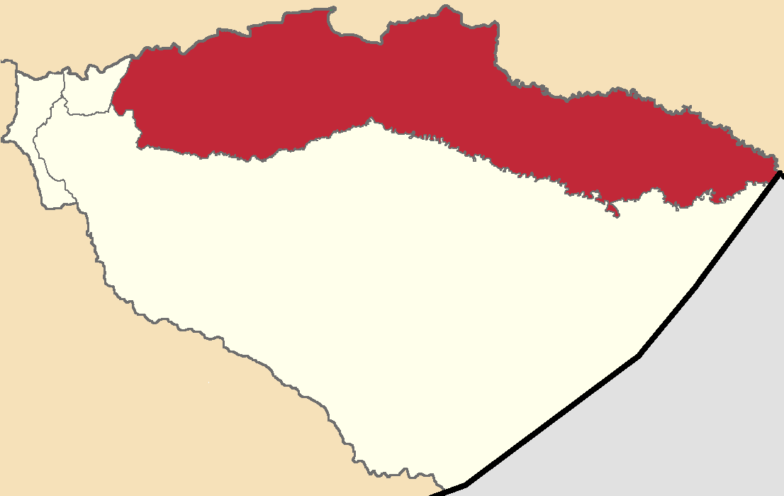 Mapa localizador del cantón en Pastaza, Ecuador